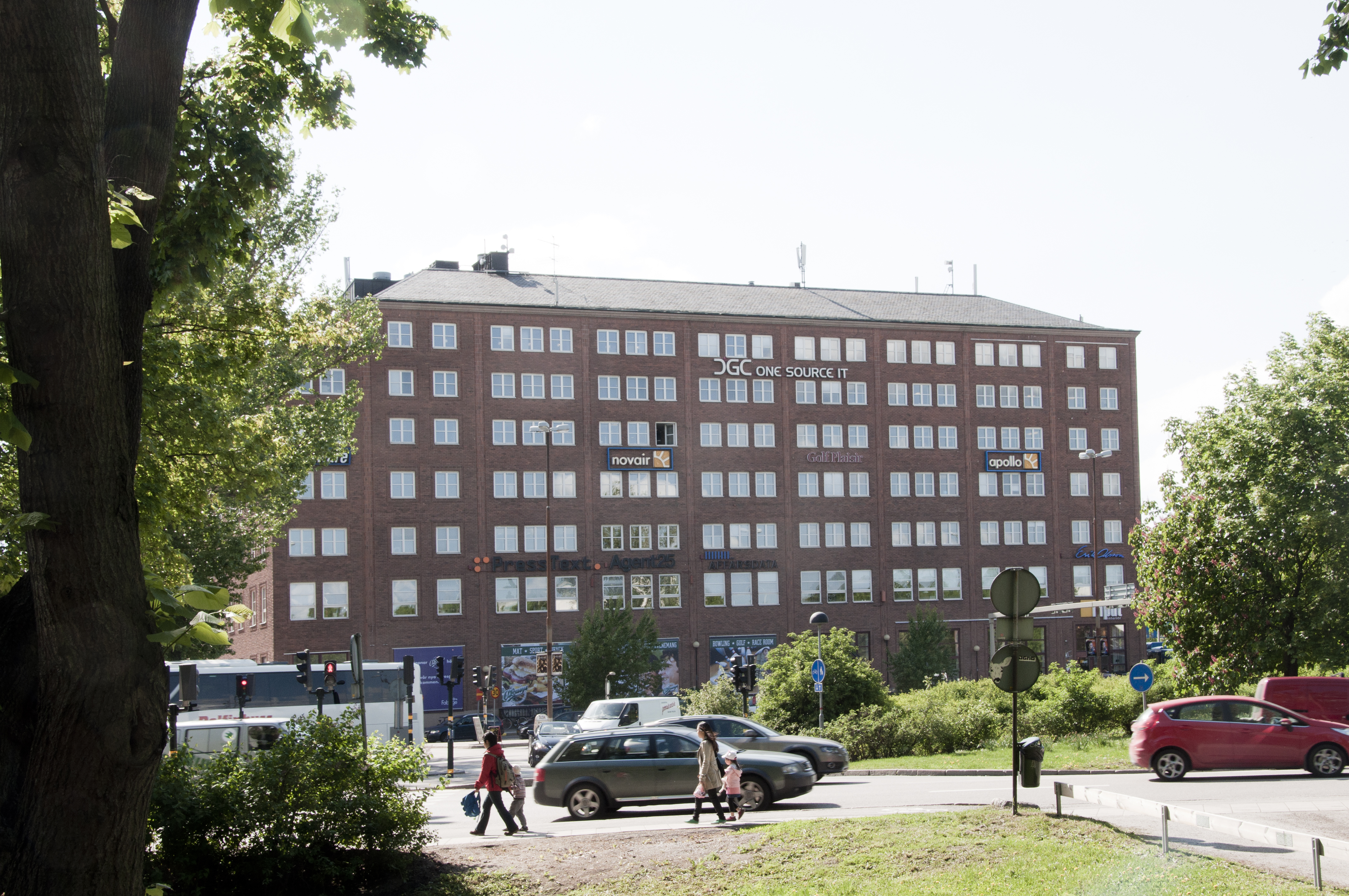 Getingen 14, Sveavägen 145-147 , Sveaplan 143, Ynglingagatan 2-4. Byggnadsår 1951 -54, arkitekt Einar Rudskog, byggherre Saxon & Lindströms Förlags AB, byggmästare AB Skånska Cementgjuteriet